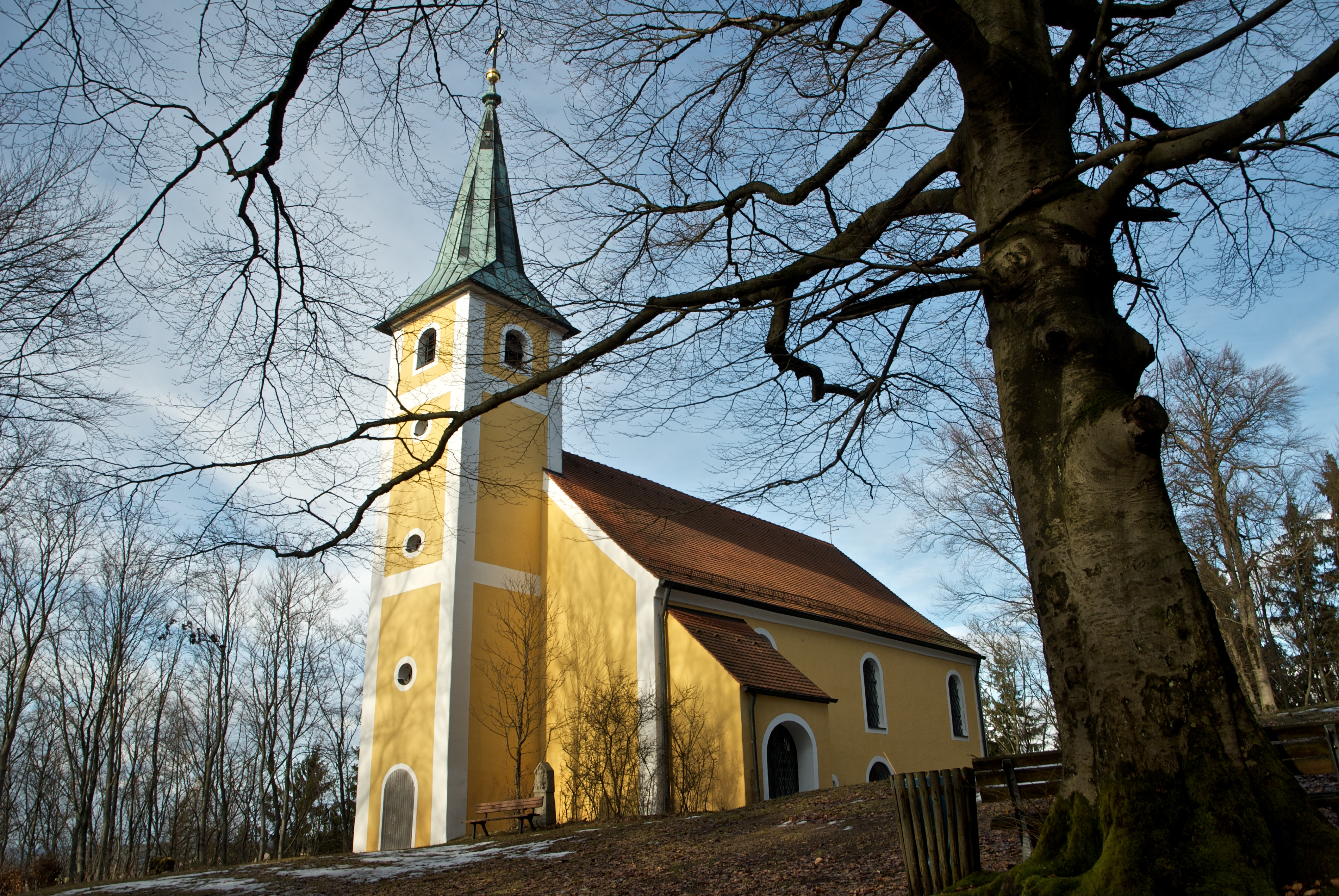 Johannisbergkirche, Gemeinde FreundenbergThis is a photograph of an architectural monument.